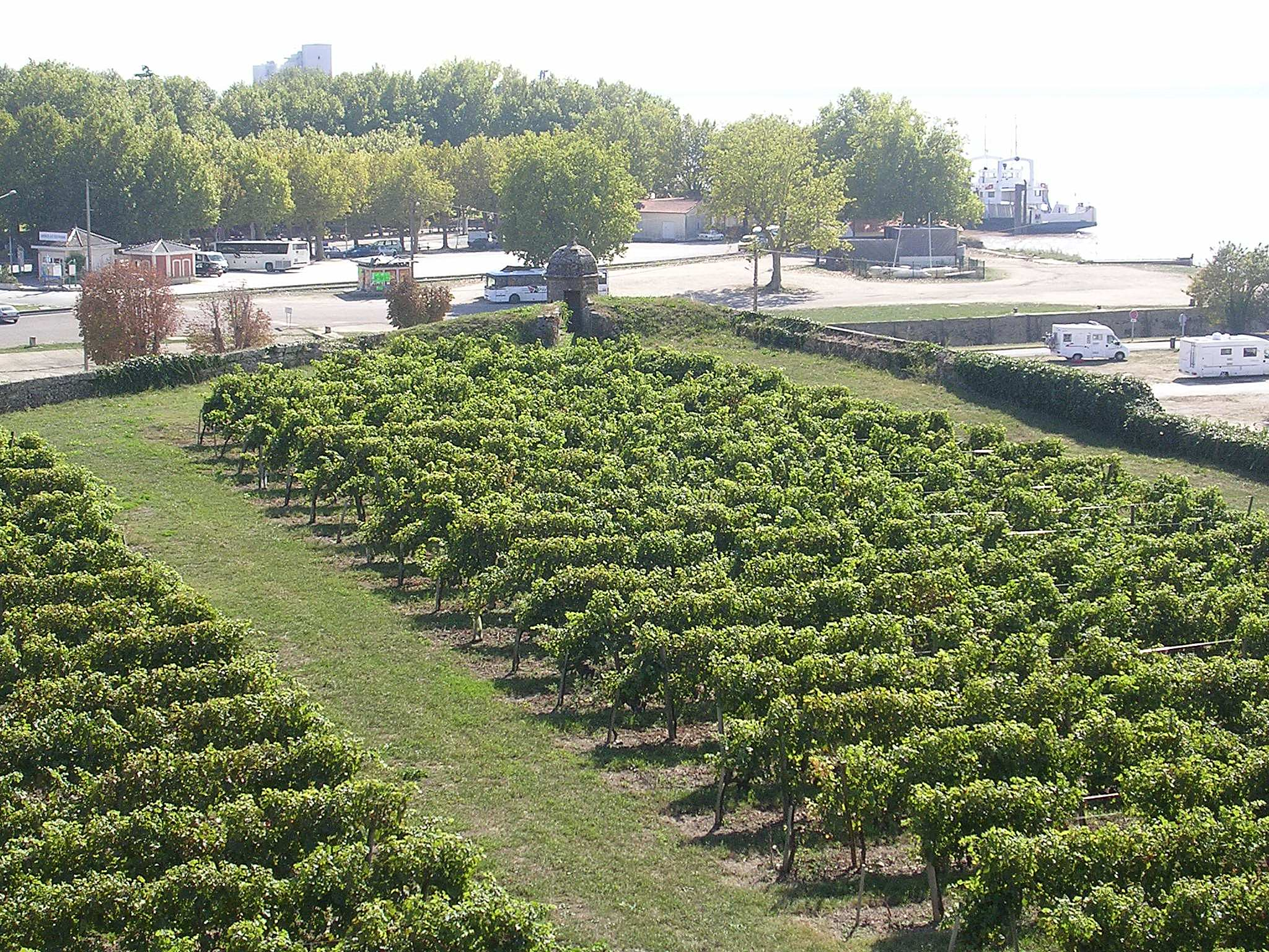 Citadelle de Blaye, vignoble de l'échauguette (vignoble dans l'enceinte de la citadelle, proche du couvent des Minimes